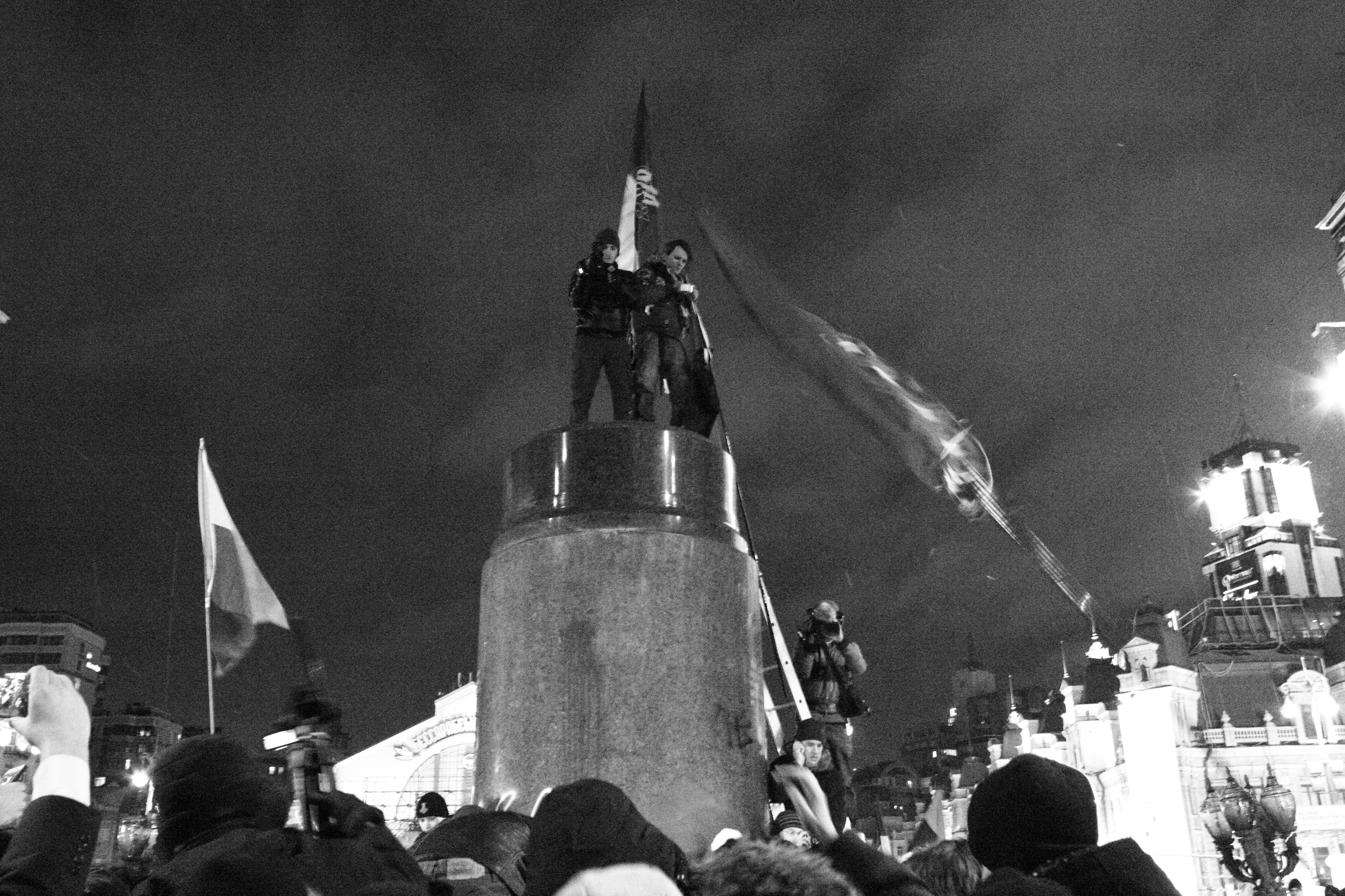 Після повалення пам'ятника Лєніну в Києві.